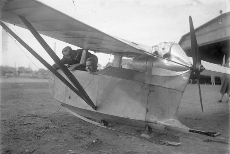 Interessante Versuche mit einem schwanzlosen Flugzeug! Der deutsche Pilot Groenhoff am Steuer des schwanzlosen Flugzeuges vor dem Start. Information added by Wikimedia users.Lippisch Storch V motor glider, probably in 1929, with Groenhoff in cockpit, right and designer Alexander Lippisch over nose.